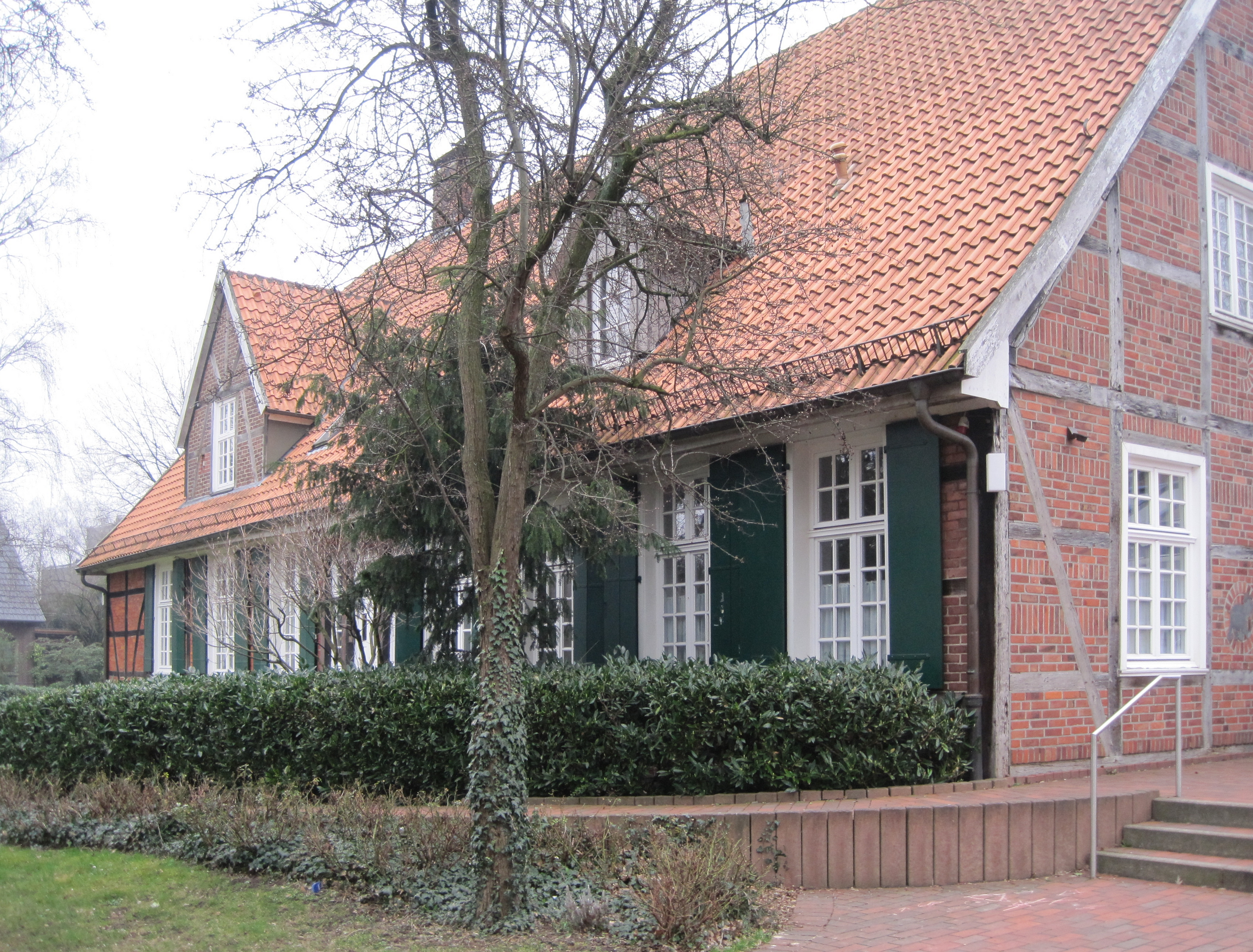 Das Foto zeigt die Vikare der St. Pankratius-Kirche in Hamm-Bockum-Hövel.